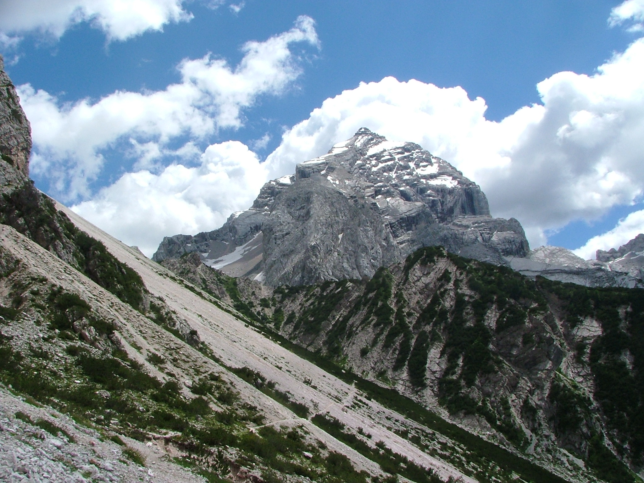 Monte Antelao dal versante di San Vito